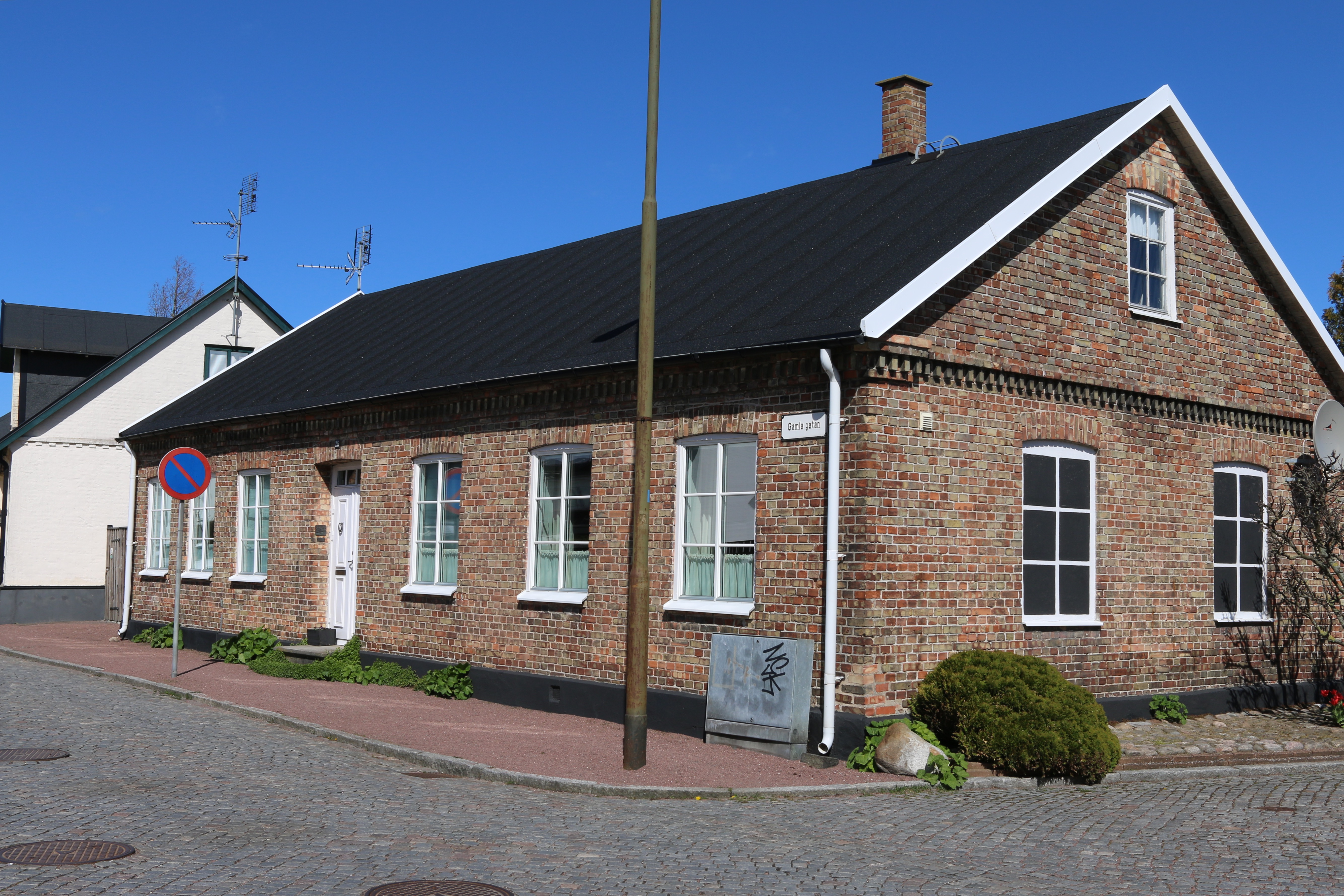 Limhamn, Gamla vägen